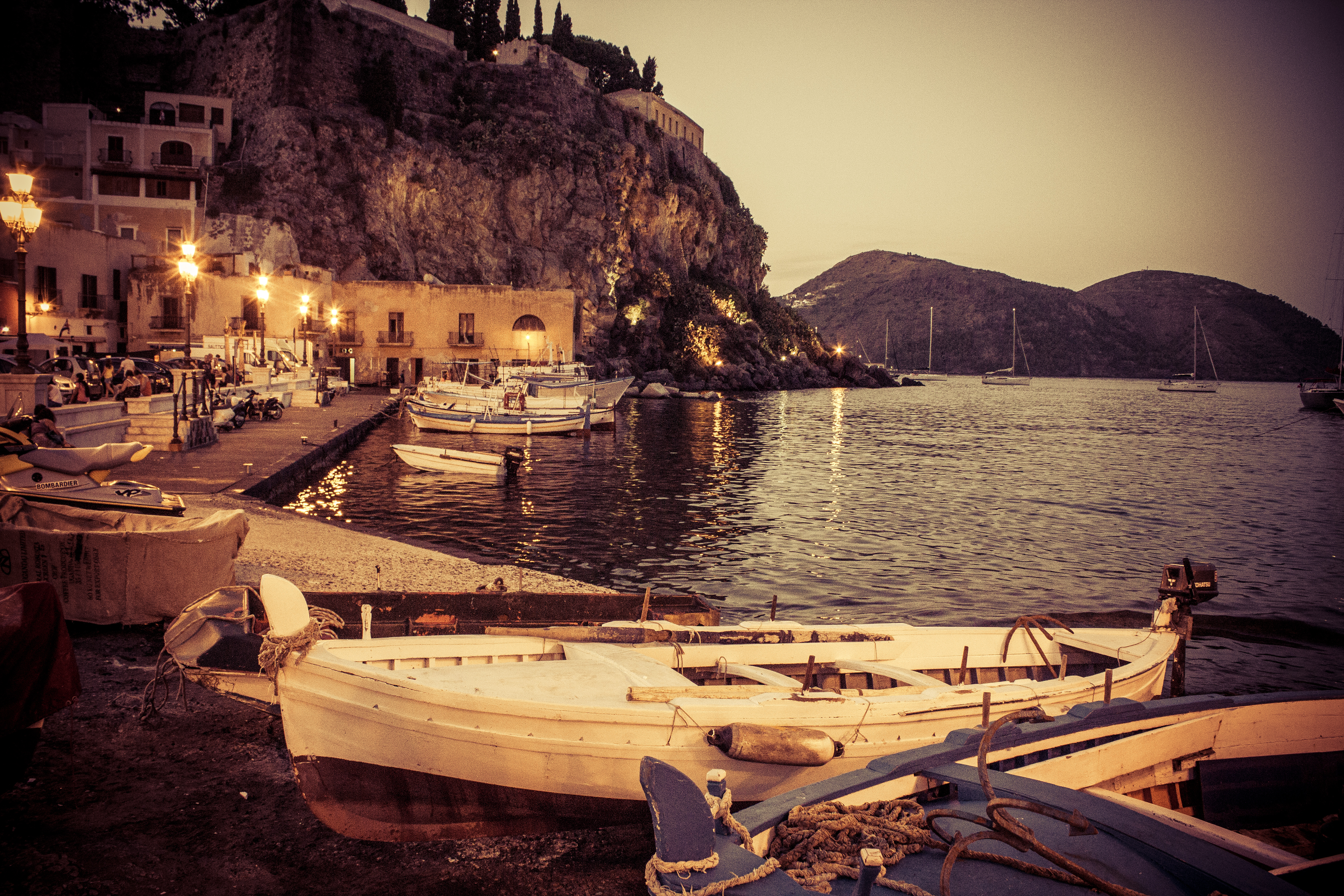 Isole Eolie